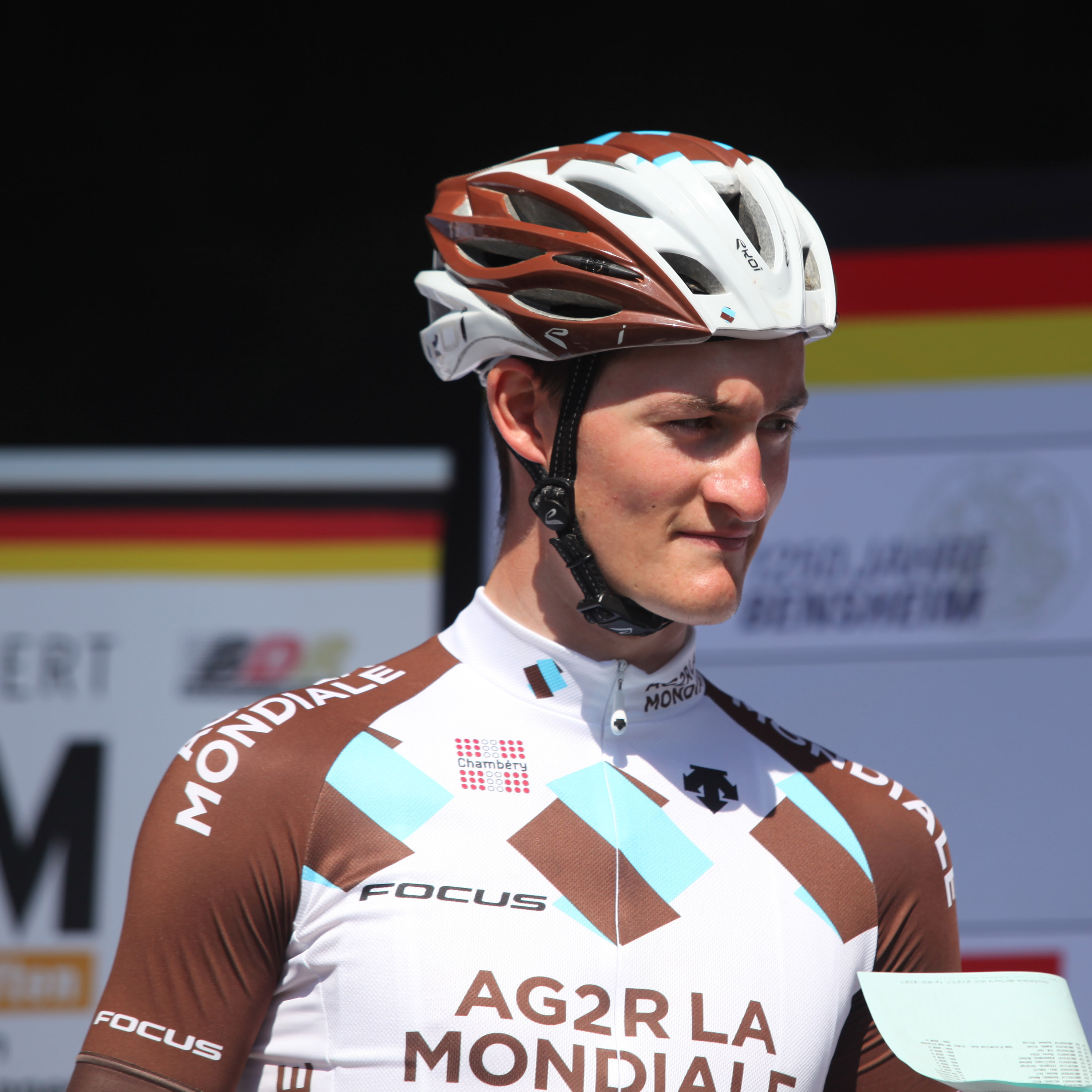 Foto von den Deutschen Meisterschaften im Straßenrennen der Männer (Elite) am 28. Juni 2015 in Bensheim (Hessen)